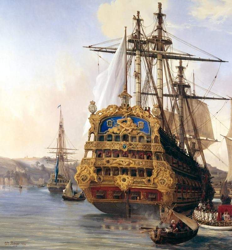 Tableau représentant le vaisseau français à trois-pont le Foudroyant en 1724 à Brest. Peinture réalisée en 1834.